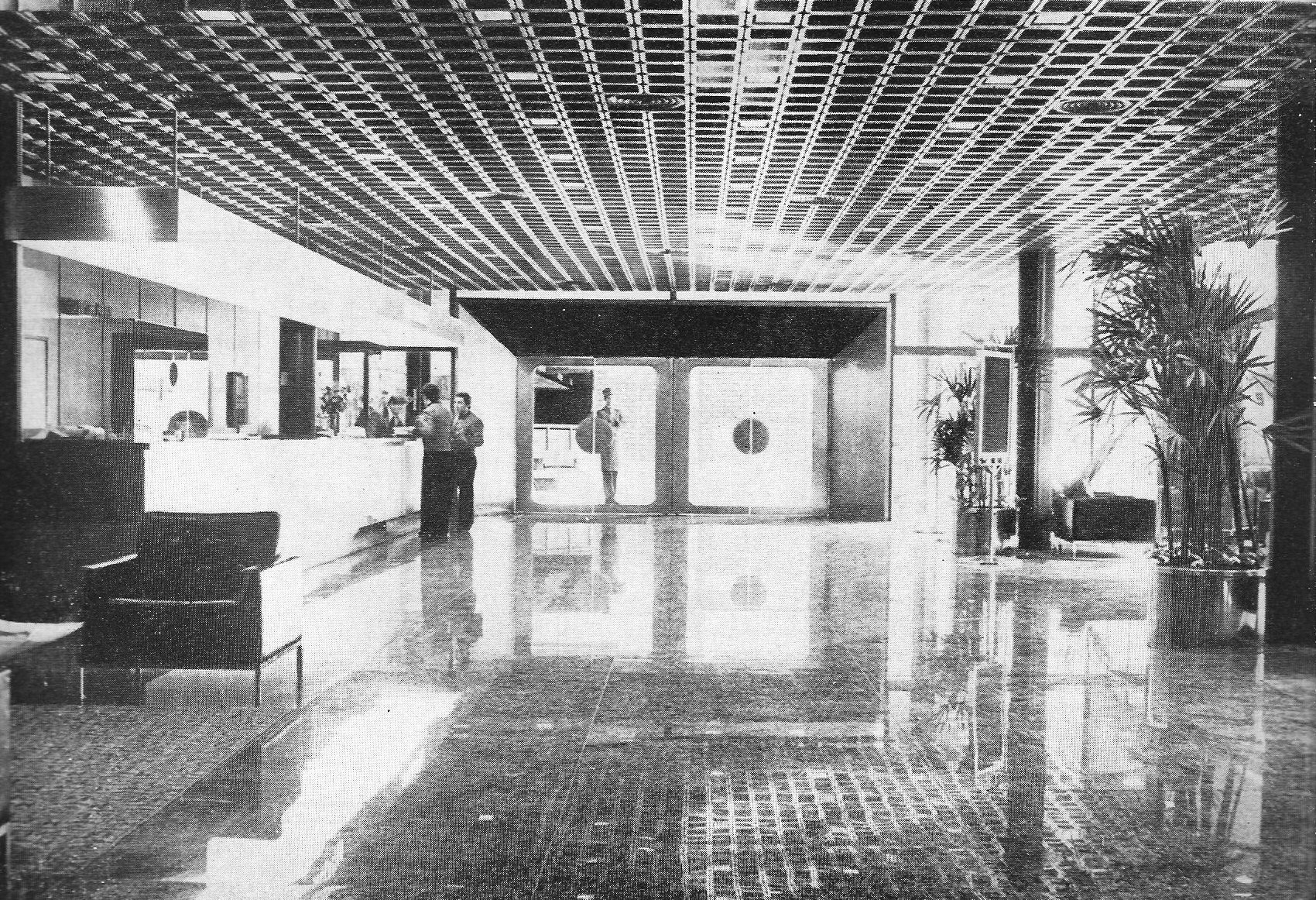 Aspecto original del hall de entrada del Hotel Libertador de Buenos Aires, actual Sheraton Libertador Hotel. Ex Kempinski Libertador. Arquitectos: SEPRA Año: 1977